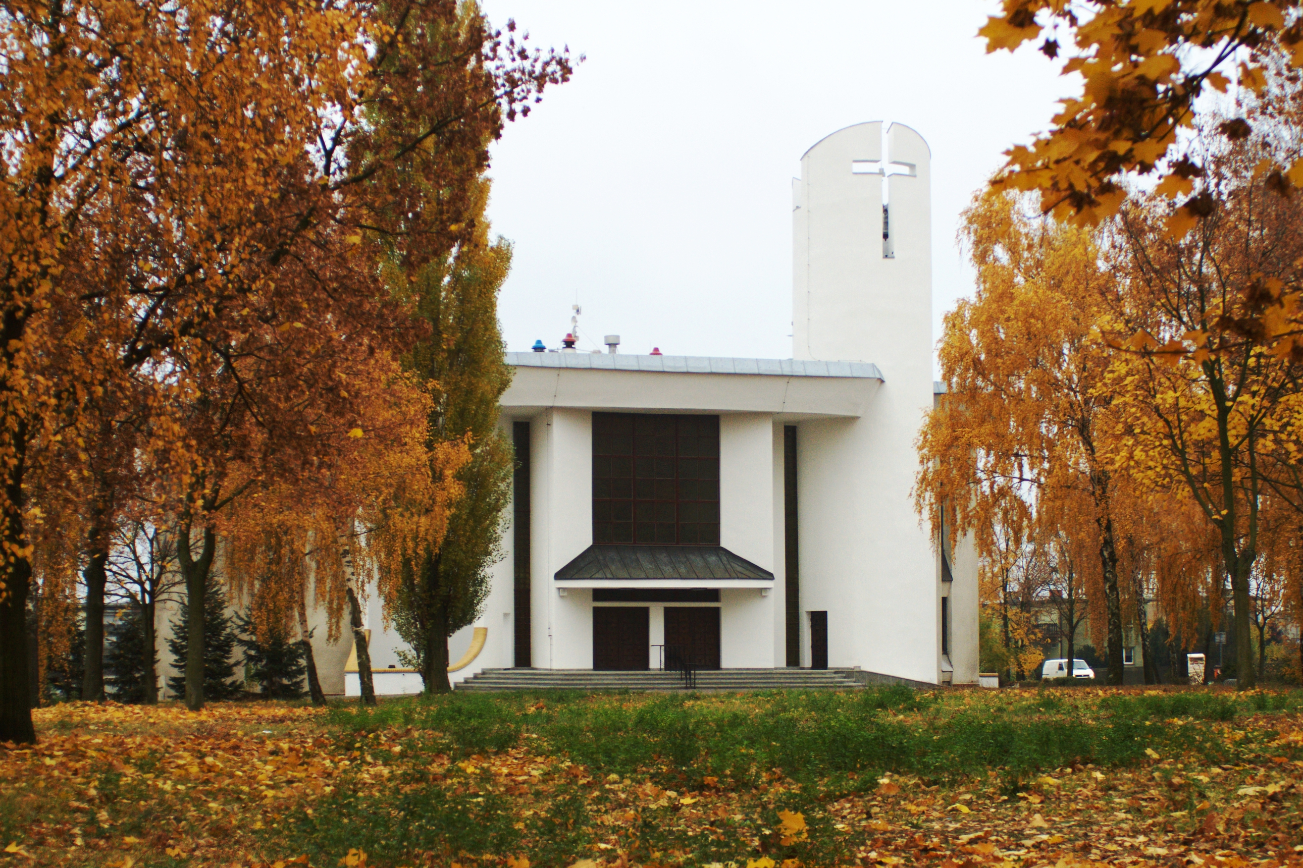 Kościół pw. NMP Matki Kościoła na poznańskim Świerczewie